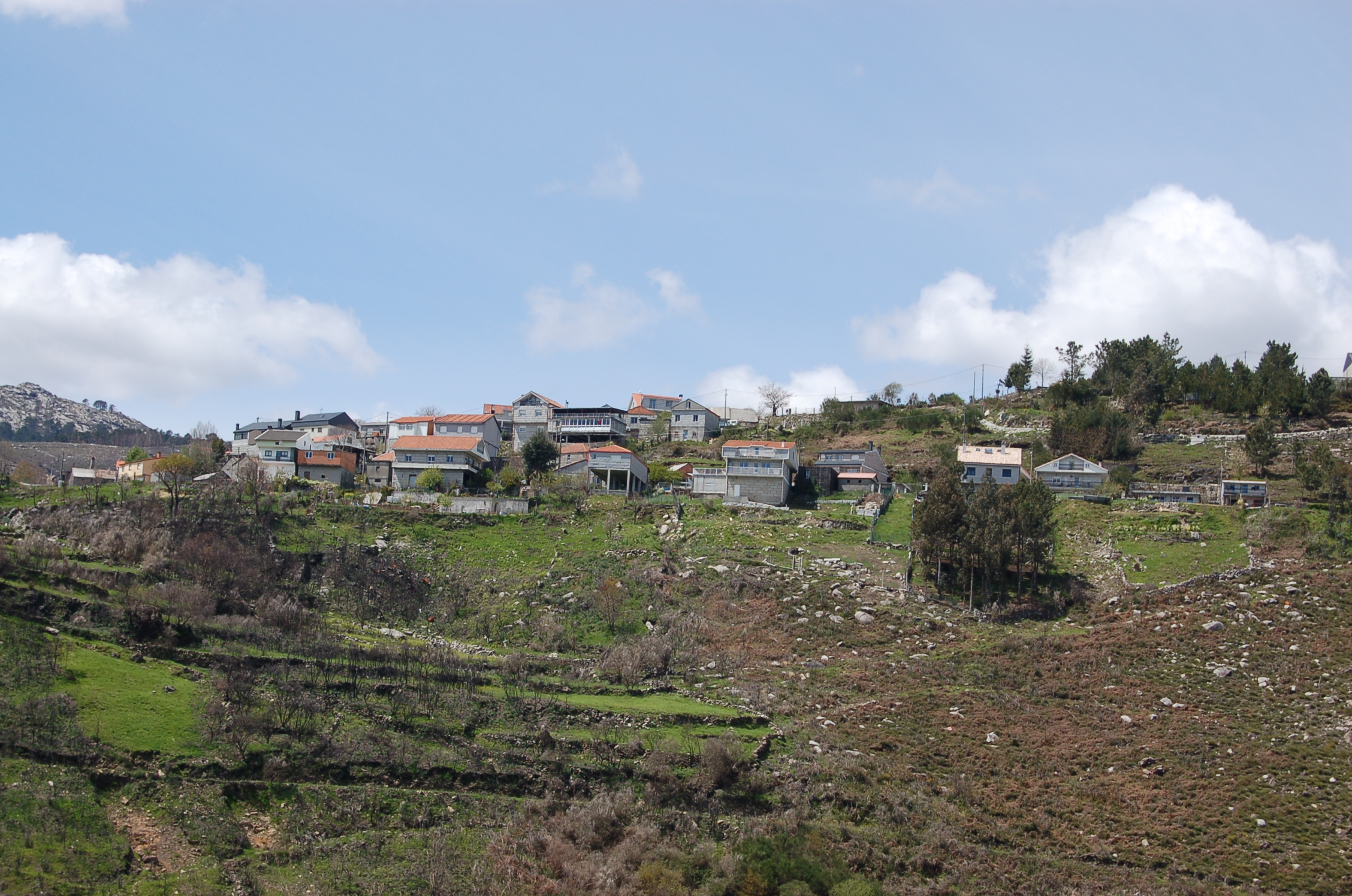 Vista da aldea de Covelo, na parroquia de Quins, no concello de Melón. Imaxe tomada desde a estrada OU-0355